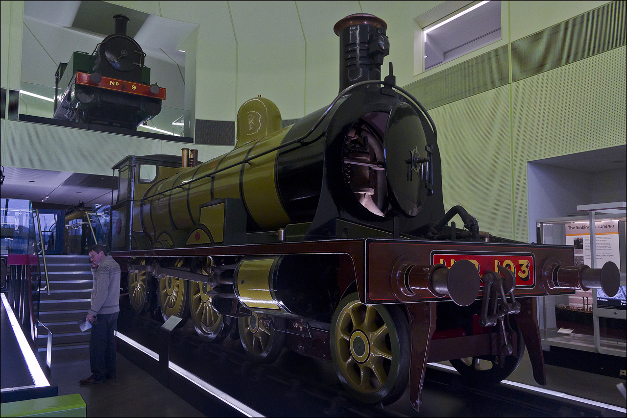 Riverside Museum, Glasgow